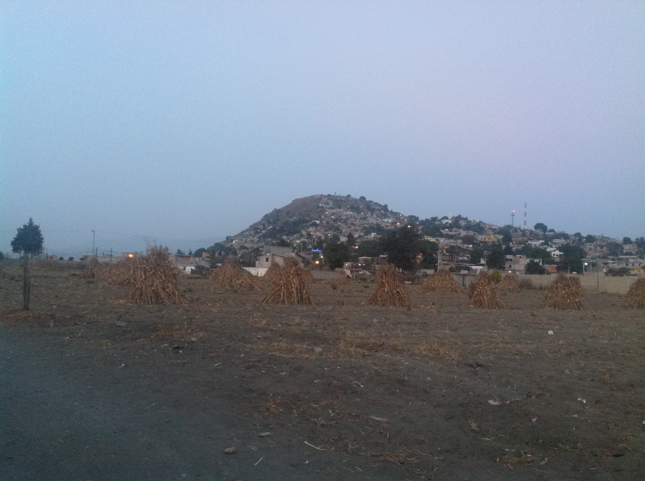 Vista de Cocotitlan